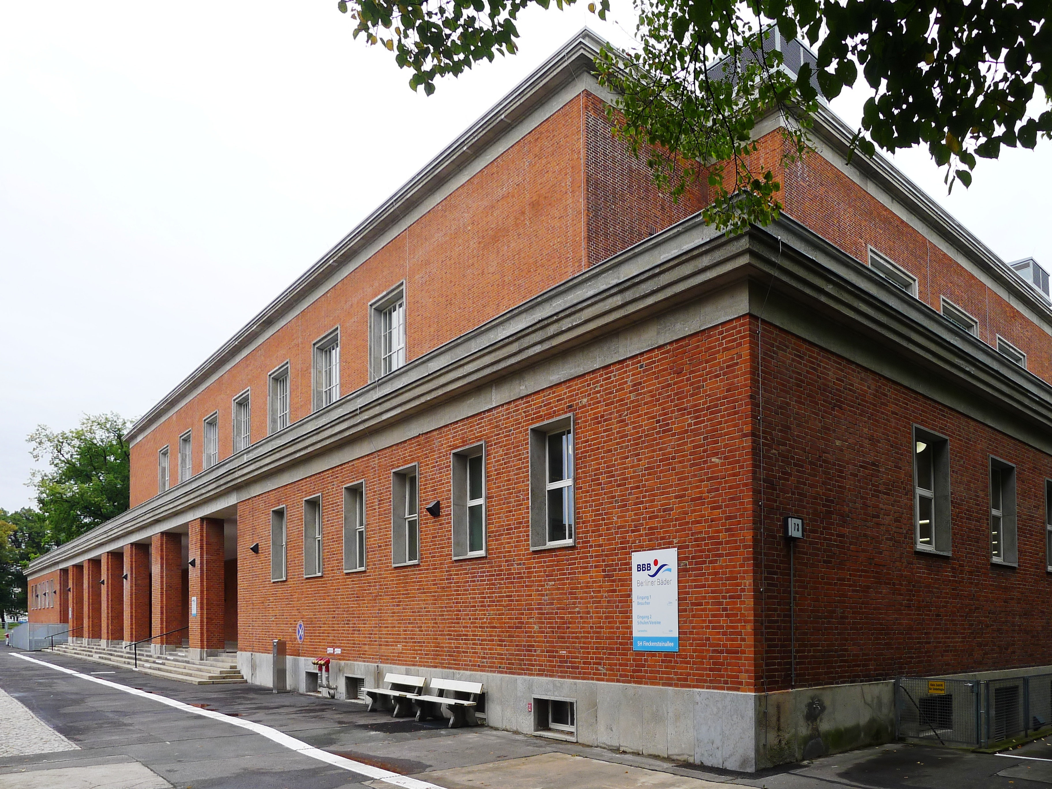 Front des Gebäudes